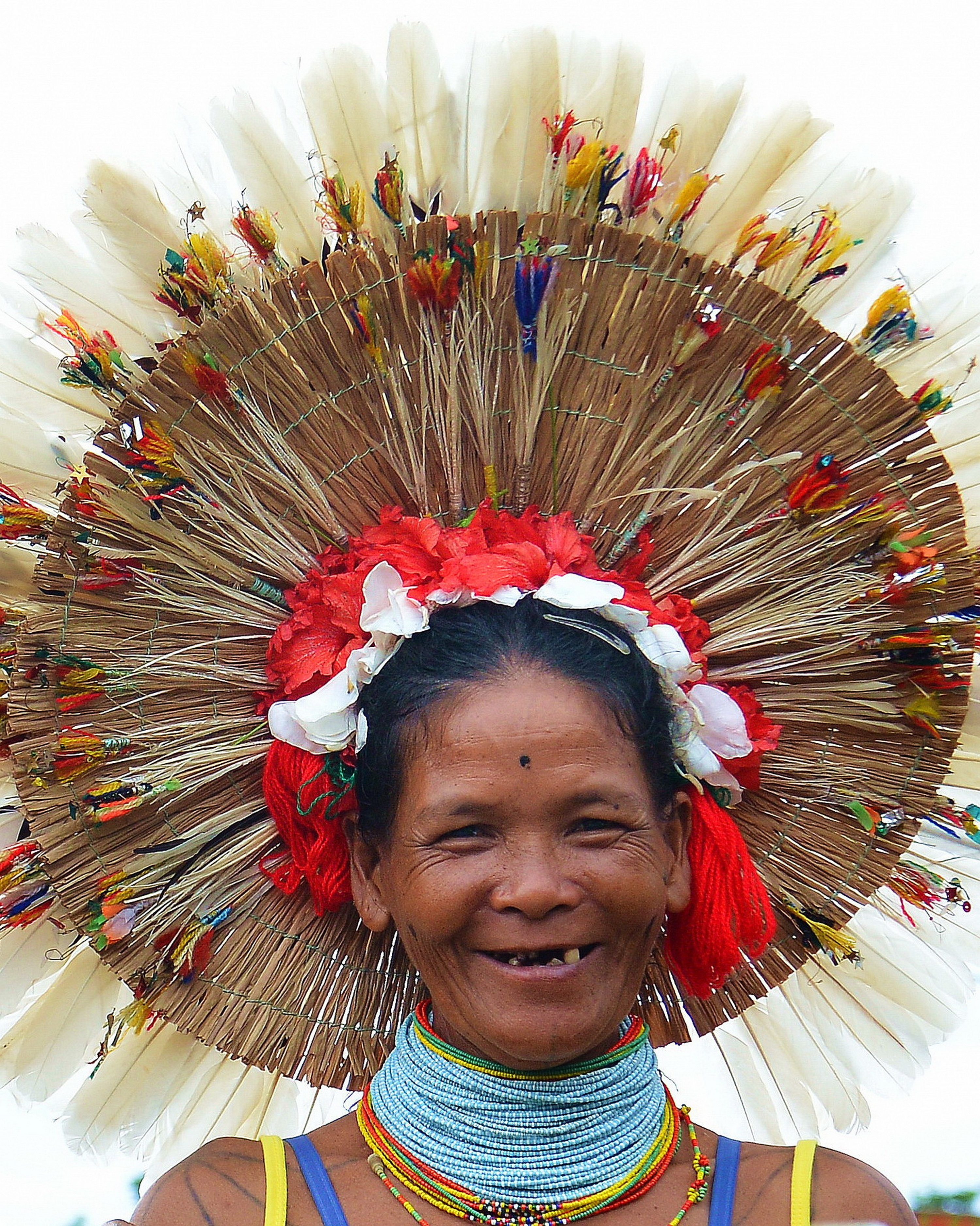 Sikerei Perempuan adalah Perempuan Dukun Pengobatan yang Pandai Menari di Kepulauan Mentawai. Jika sakit, orang biasanya pergi ke dokter atau ke ahli pengobatan alternatif untuk menyembuhkan penyakit. Namun berbeda dengan masyarakat di pedalaman Kepulauan Mentawai, Kecamatan Siberut Selatan, Kapubaten Kepulauan Mentawai, Sumatra Barat.